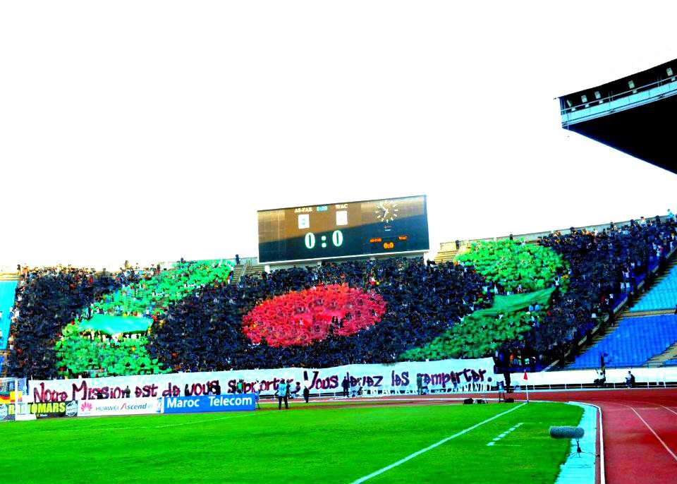 tifo des supporters askary lors de la final de la coupe du trône 2012